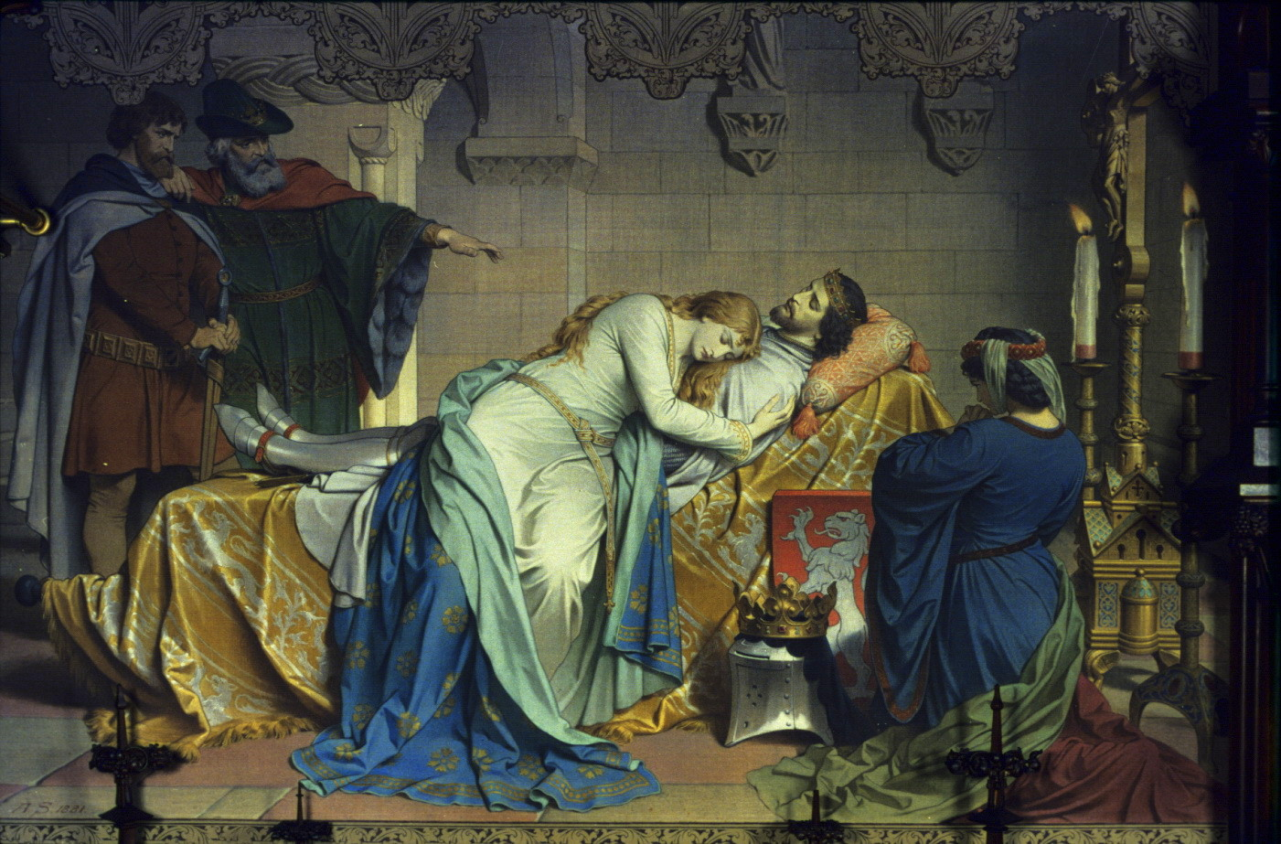 Einsam wachend in der Nacht - Liebestod